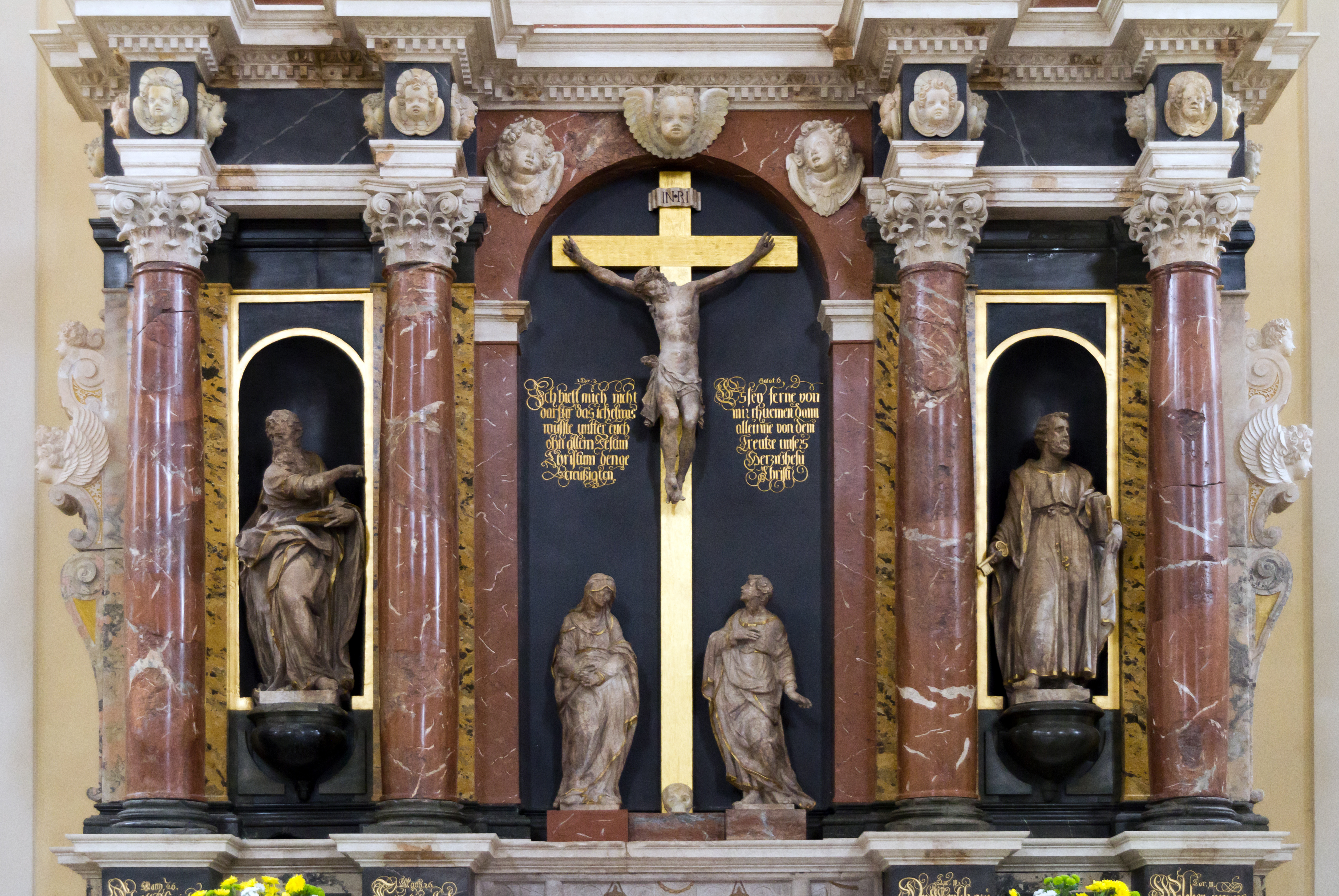 Mittelteil des Nosseni-Altars